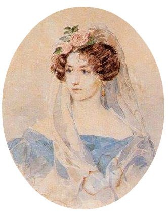 Любовь Корниловна Маковская, ур. Молленгауэр (1800—1893)